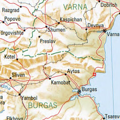 Slantschew Brjag - Lage des Ortes in Bulgarien